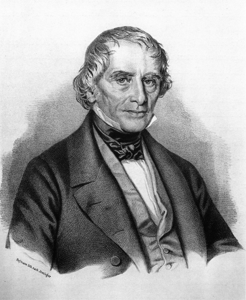 Hans Caspar Escher (1775–1859), Industrieller, Architekt und Politiker aus Zürich. Gründer der Escher Wyss Maschinenfabrik